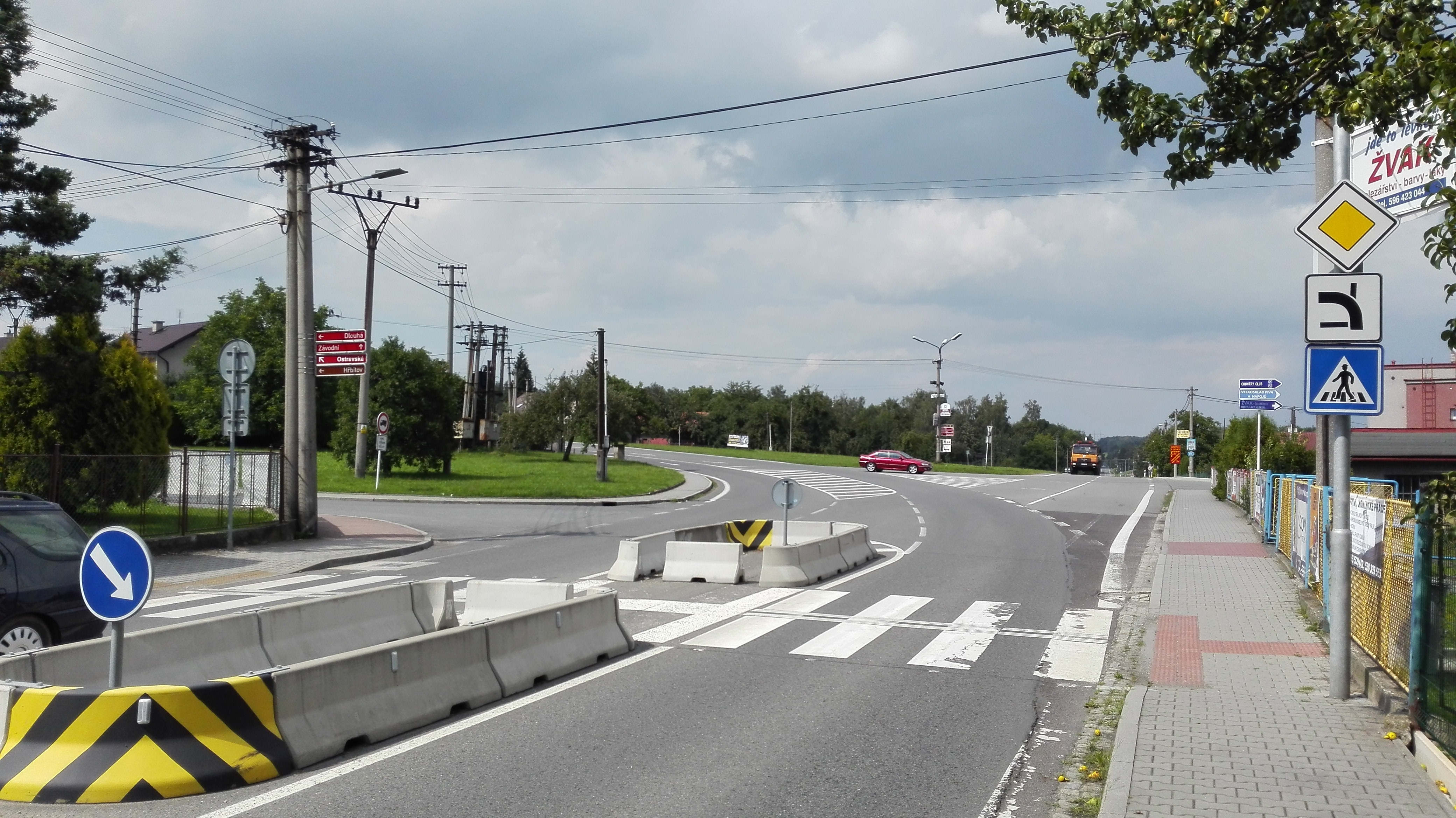 Těrlicko, křižovatka silnic I/11 (zatáčí vpravo, směr Havířov, Ostrava) a II/474 (směřuje rovně, směr Orlová, Karviná) v centru obce.